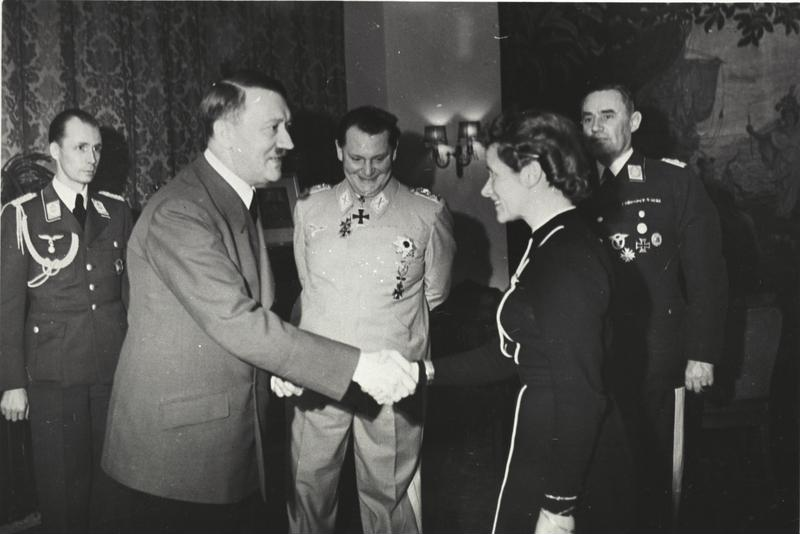 März 1941: Adolf Hitler verleiht Flugkapitän Hanna Reitsch das Eiserne Kreuz [2. Klasse] Mitte: Hermann Göring Information added by Wikimedia users.